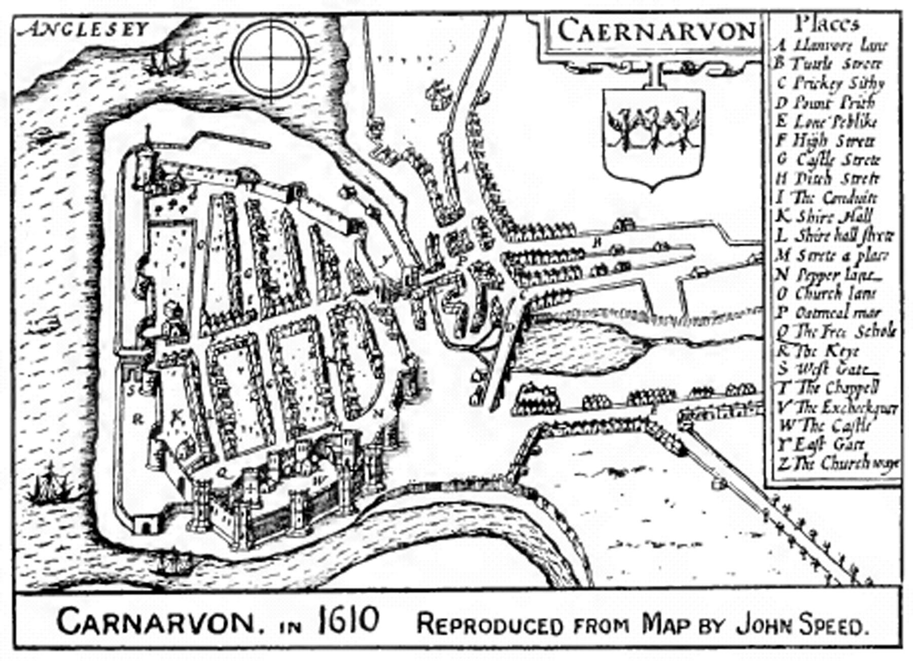 Caernarfon, 1610